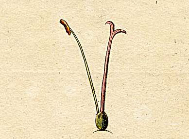 Ausschnitt (Klasse I) aus Ehrets Tafel "Methodus Plantarum Sexualis"